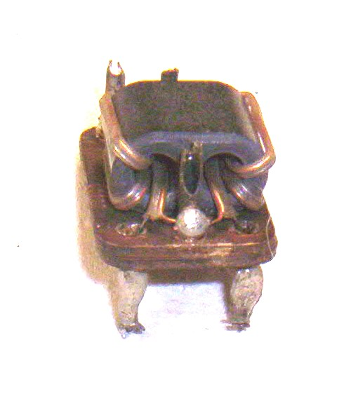 Symmetrierglied mit Ferrit-Doppellochkern für den Frequenzbereich 47...270MHz, Breite ca. 15mm